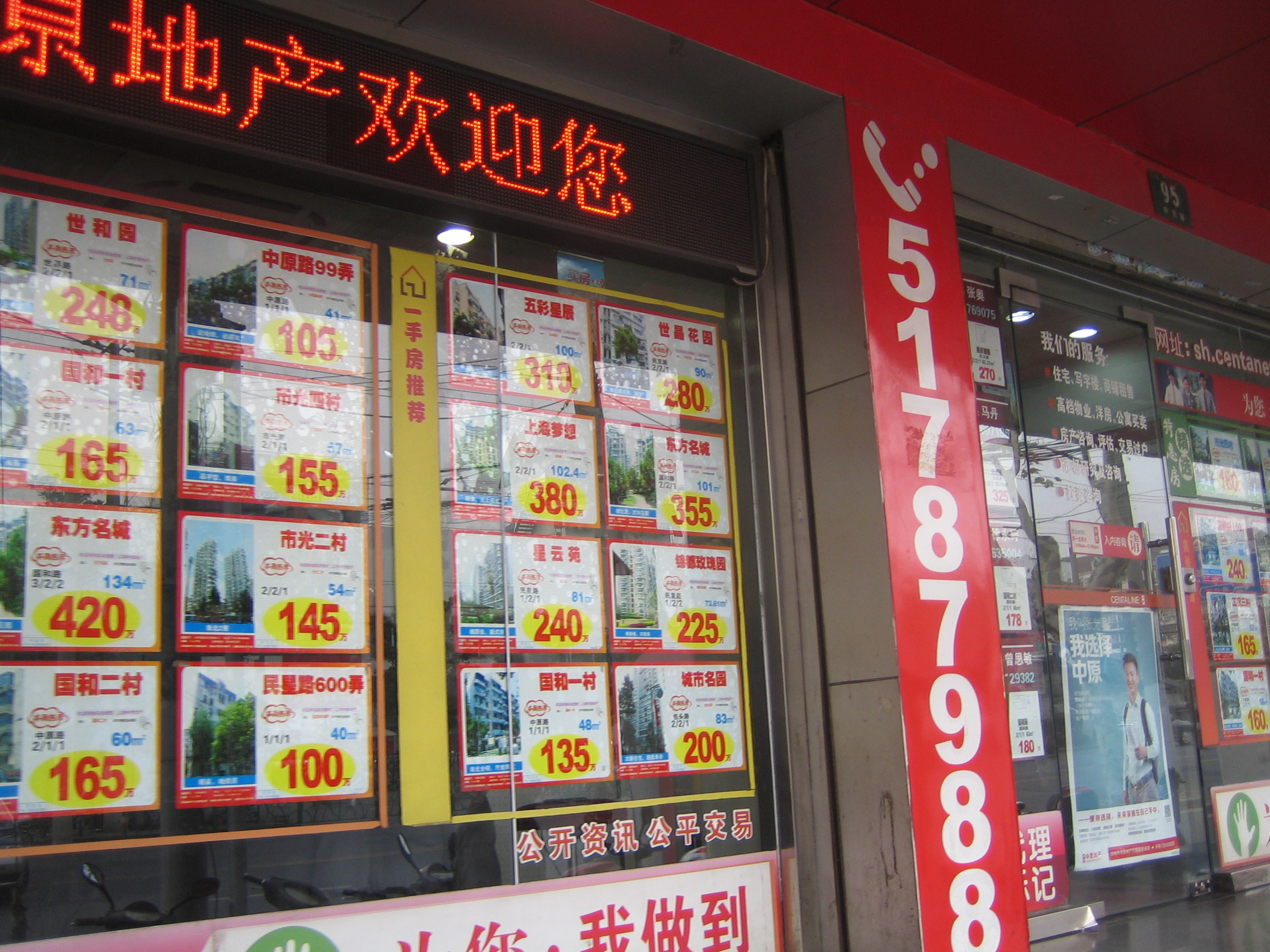 中原地产在上海杨浦的门市